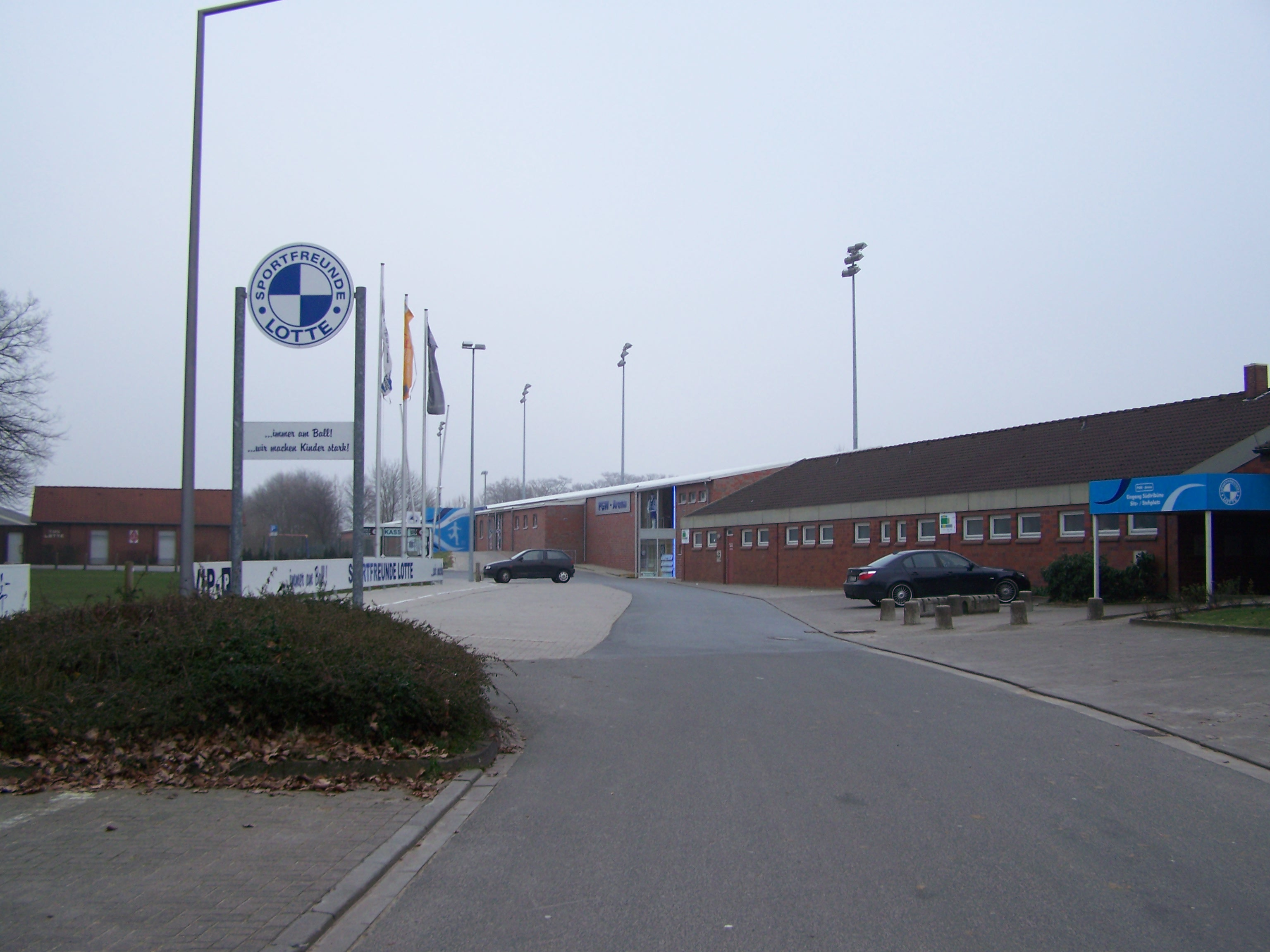 PGW Arena Sportfreunde Lotte